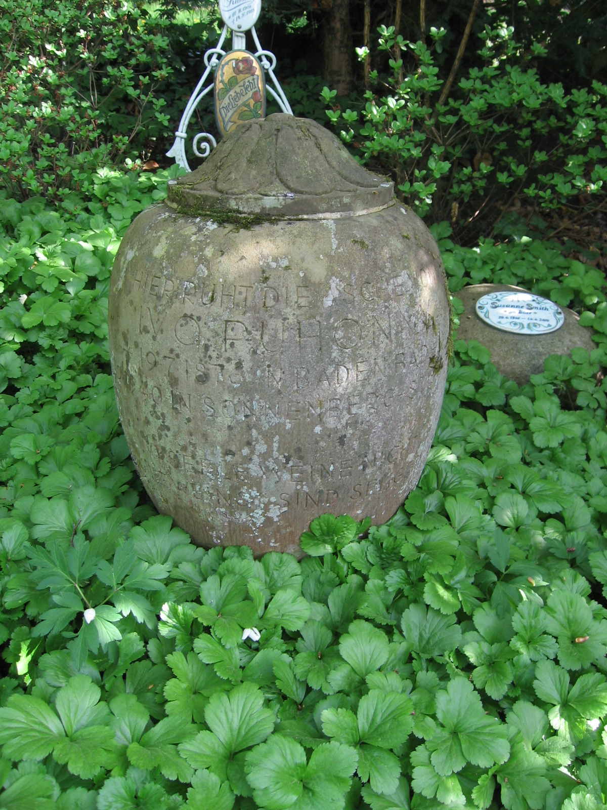 Urne von Ivo Puhonny auf dem Friedhof in Baden-Baden